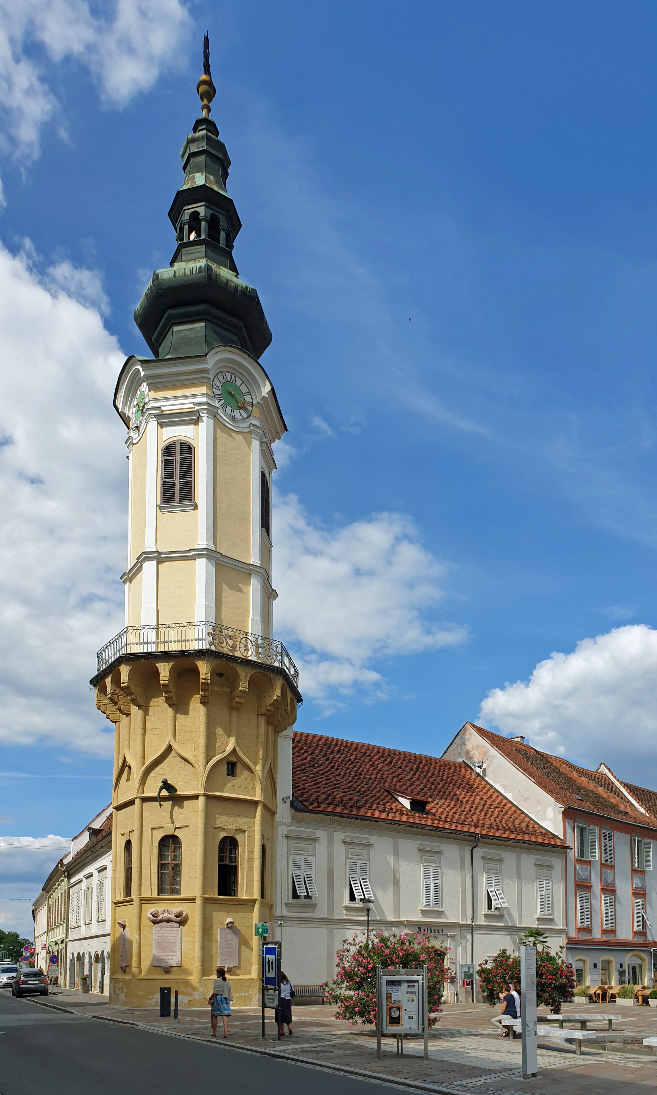 Rathaus